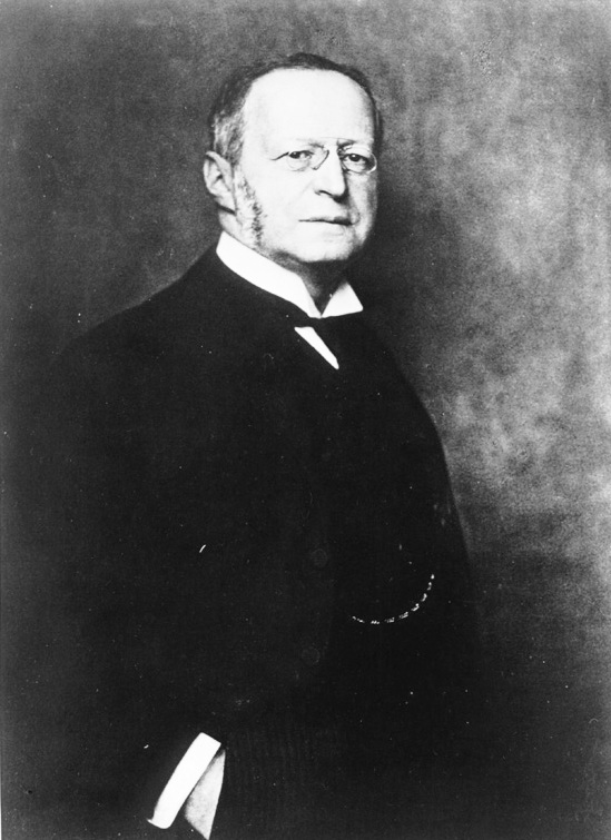 Ernst von Mendelssohn-Bargtholdy (1846-1909), deutscher Privatbankier